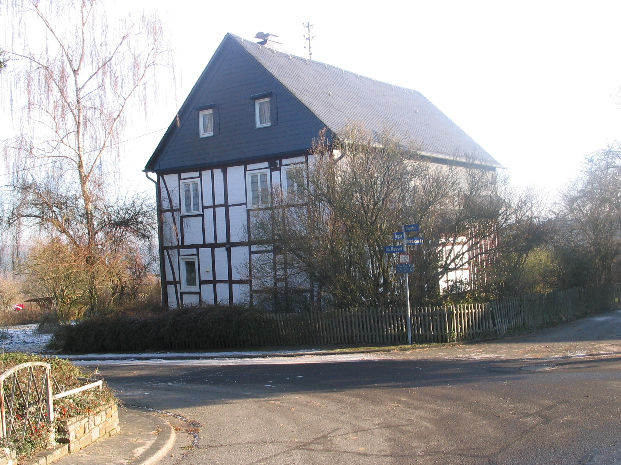 Fachwerkhaus in Sosberg